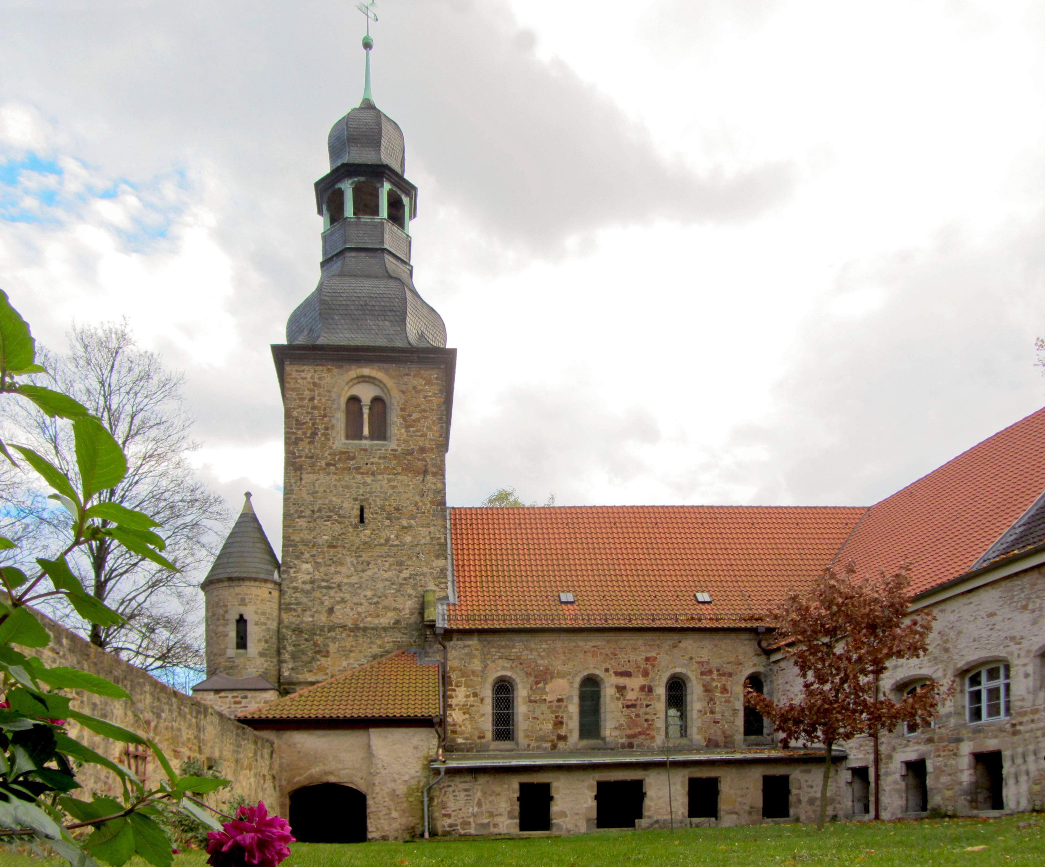 Ehemaligem Stiftskirche / Kloster Marienborn